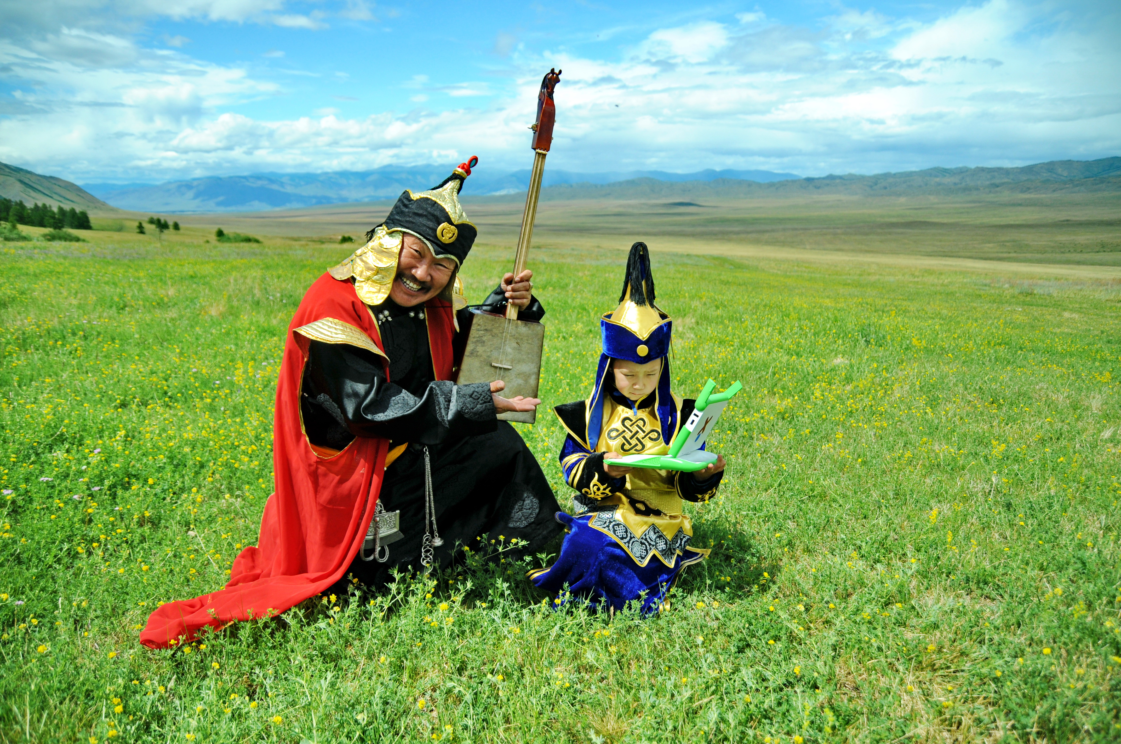 Ондар Конгар-оол Борисович - Народный Хоомейжи Республики Тыва, местечко "Тос-Булак", в 9 километрах от г. Кызыла, Республики Тыва. Вместе с родственником. Тыва, недалеко от села Ийме